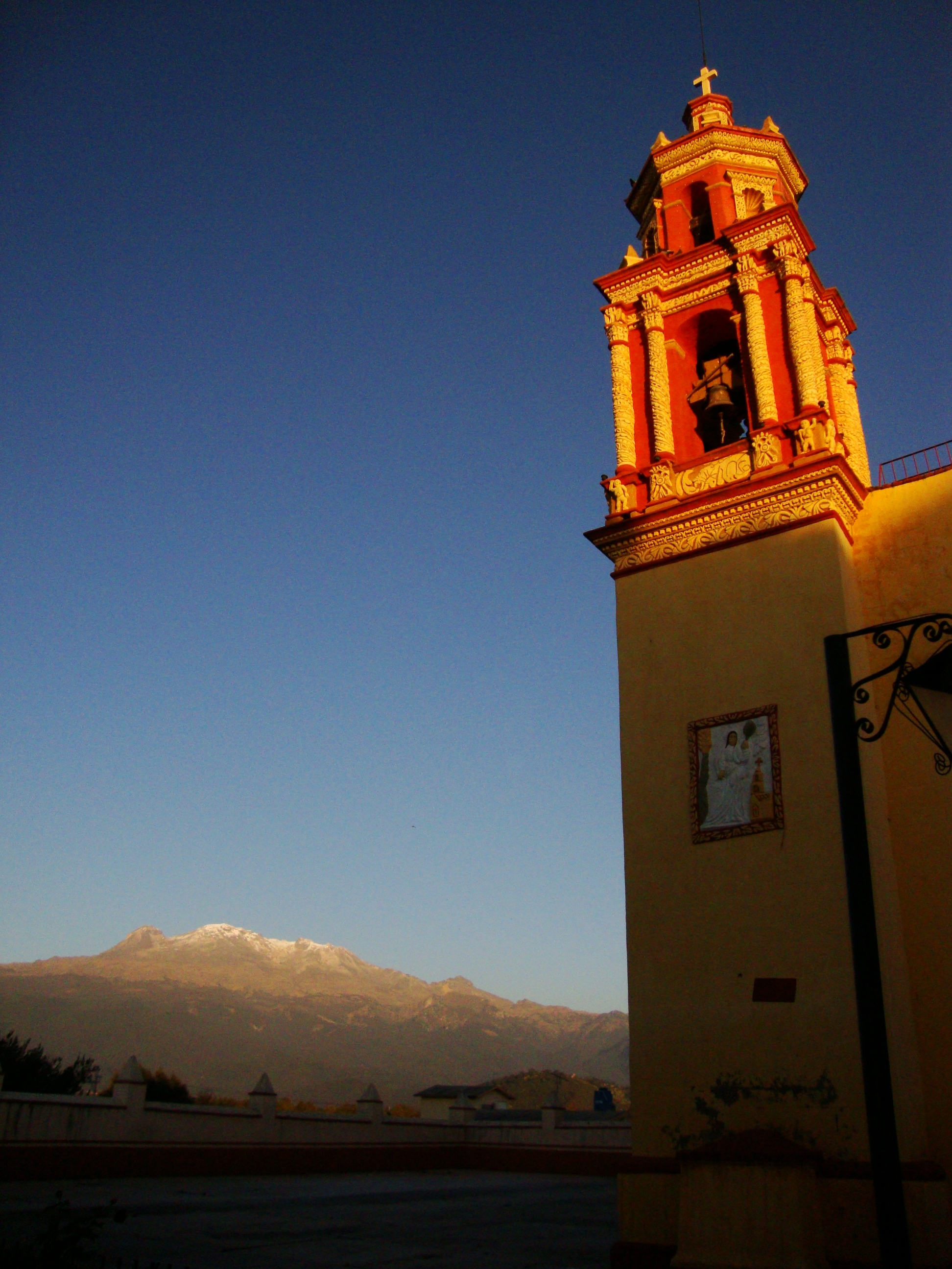 Parroquia de Santiago Apóstol en Ayapango. Detras de la iglesia el volcan Iztaccihuatl.